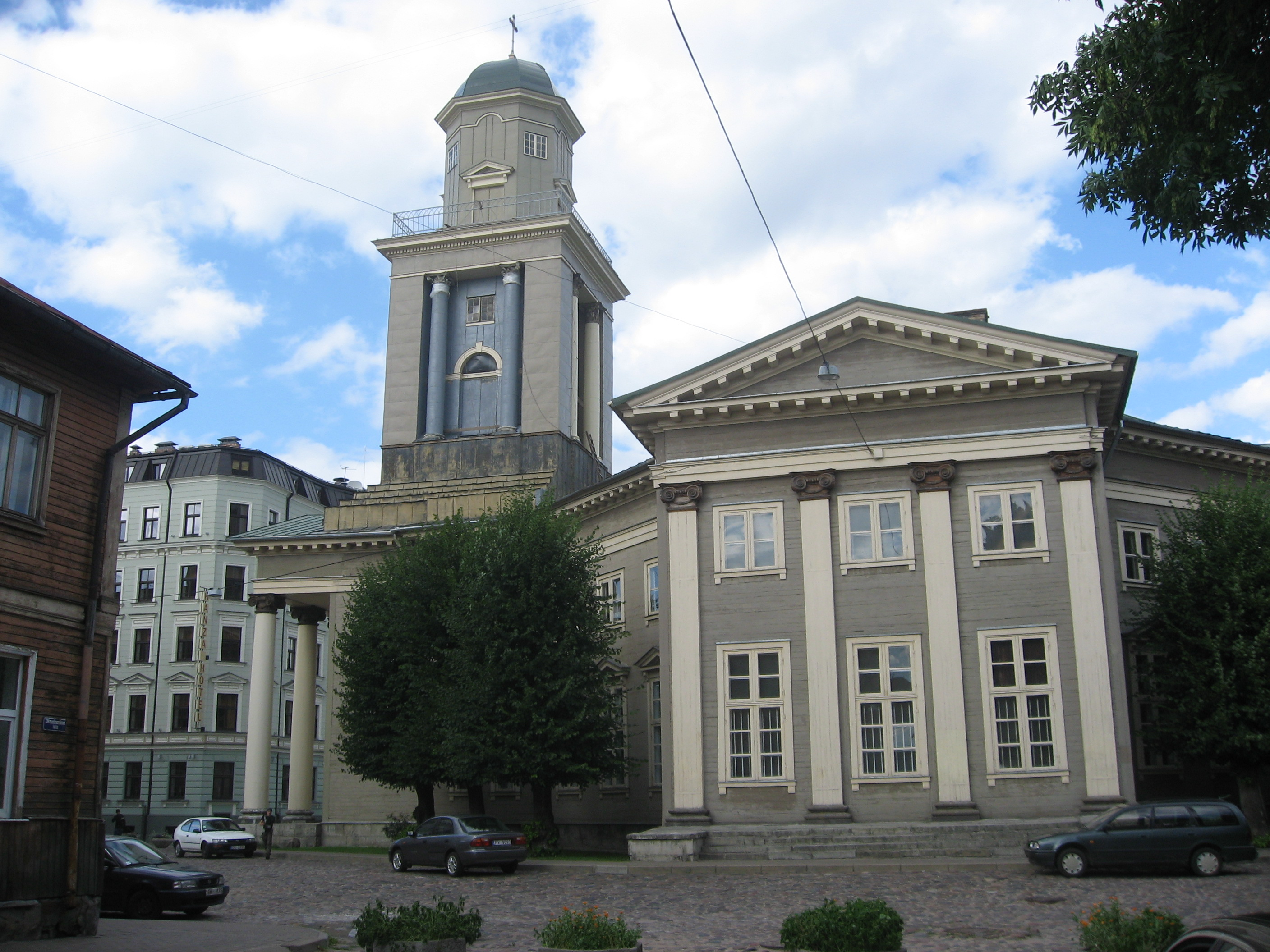 Rīgas Jēzus evanģēliski luteriskā baznīca